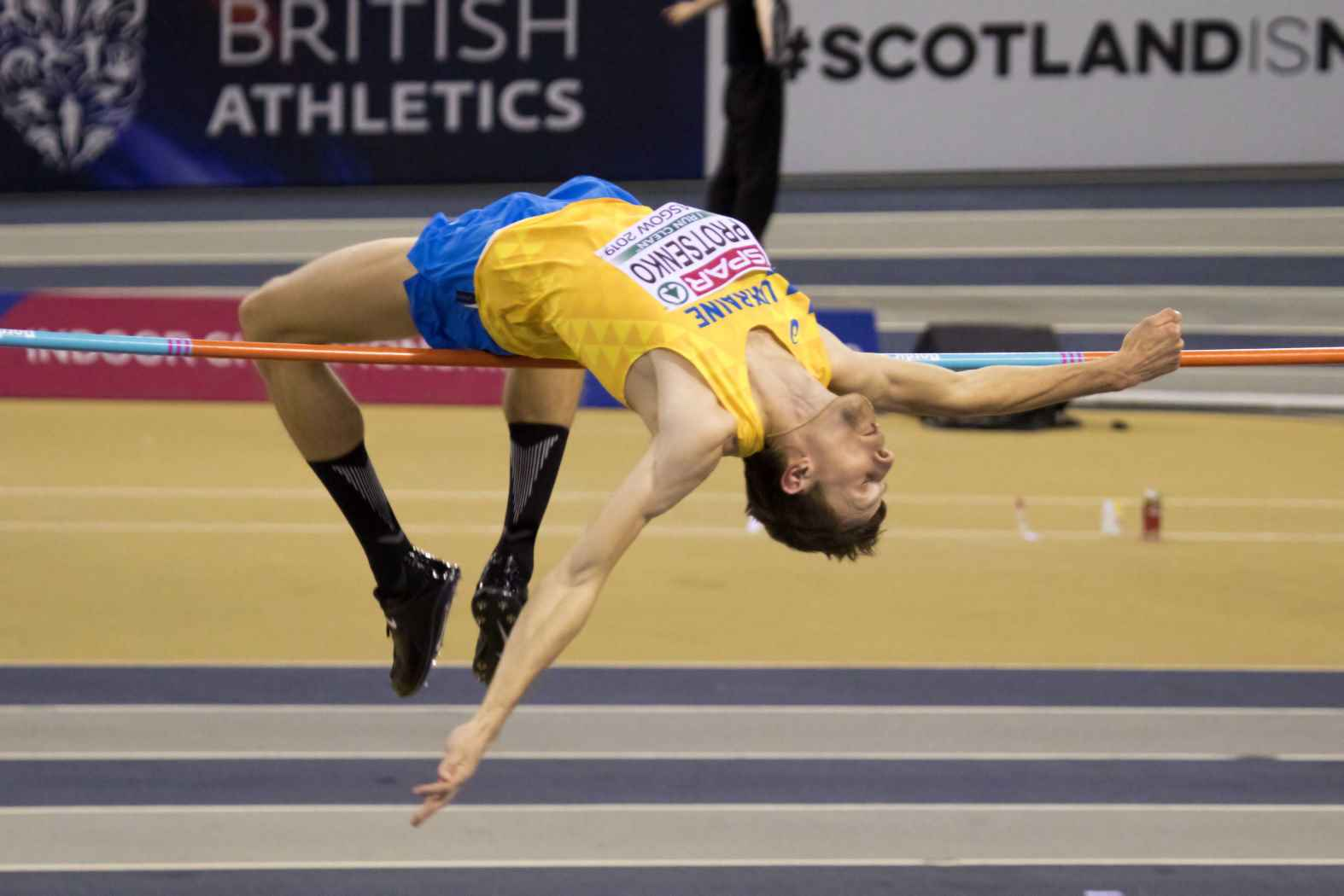 EKI20305 finale hoog protsenko